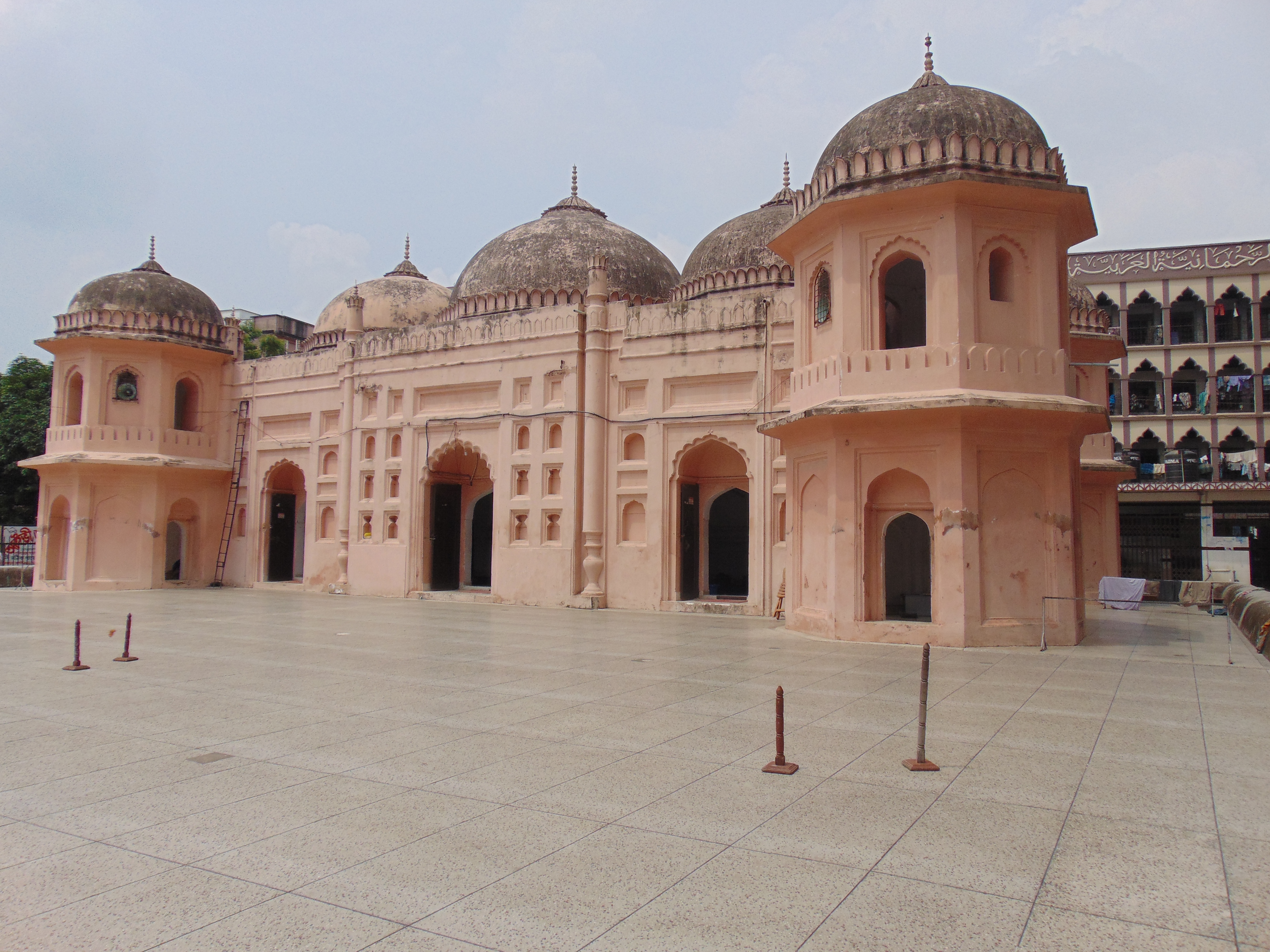 সাত গম্বুজ মসজিদ ঢাকার মোহাম্মদপুরে অবস্থিত মুঘল আমলে নির্মিত একটি মসজিদ। এই মসজিদটি চারটি মিনারসহ সাতটি গম্বুজের কারনে মসজিদের নাম হয়েছে 'সাতগম্বুজ মসজিদ'। এটি মোঘল আমলের অন্যতম নিদর্শন।